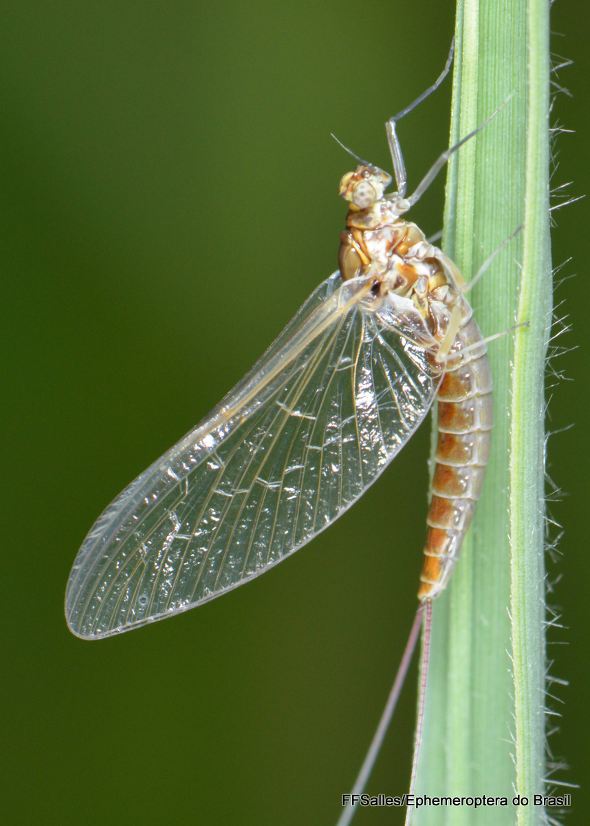 Adulto de Ephemeroptera da Região Paleártica.